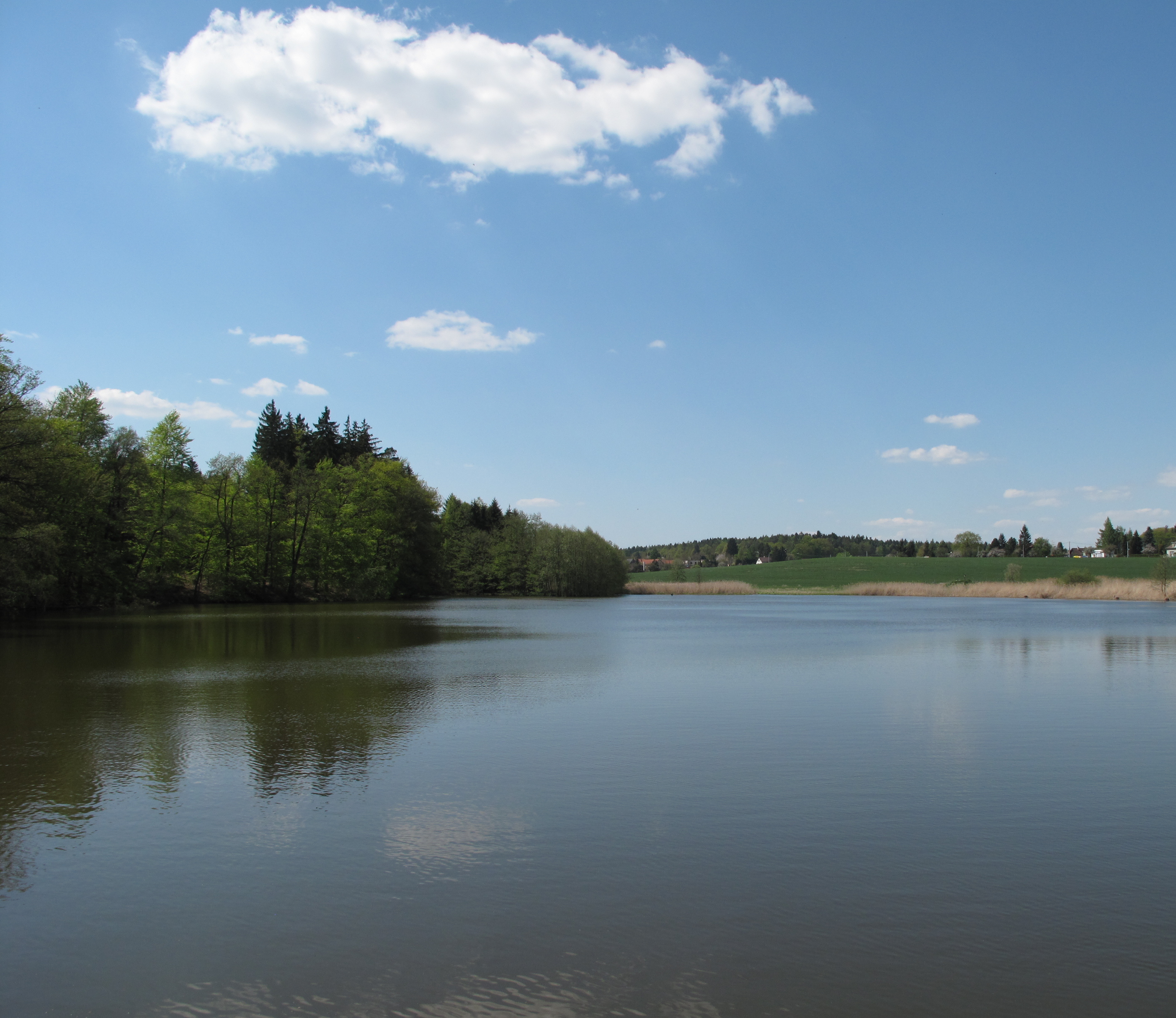 Rybník Pařez. Okres Praha-východ, Česká republika.